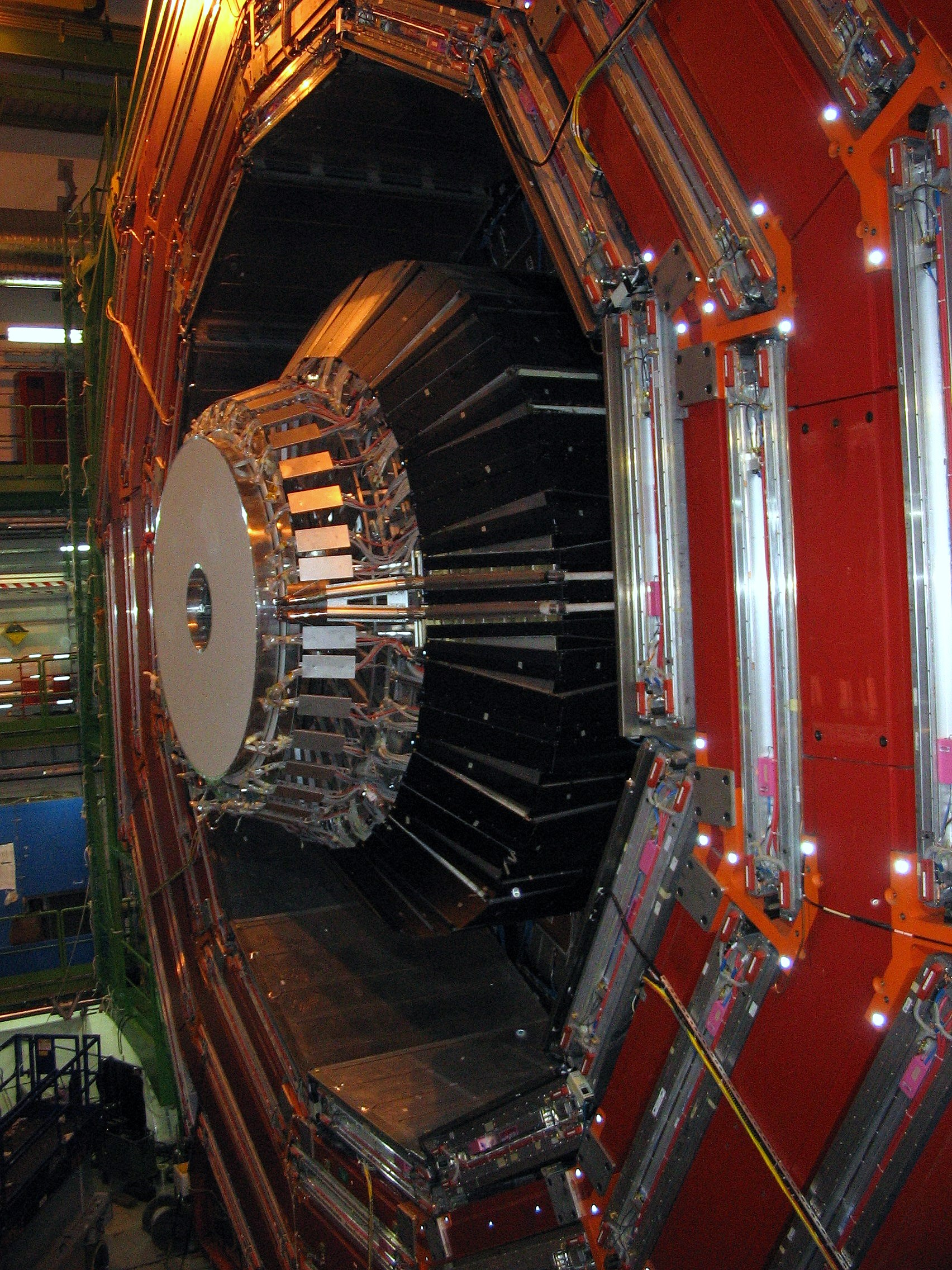 Der CMS Detektor des LHC im Februar 2008